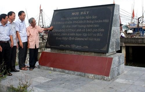 Bia tưởng niệm tại cảng cá Lạch Hới về sự kiện dân quân miền nam tập kết ra Bắc.